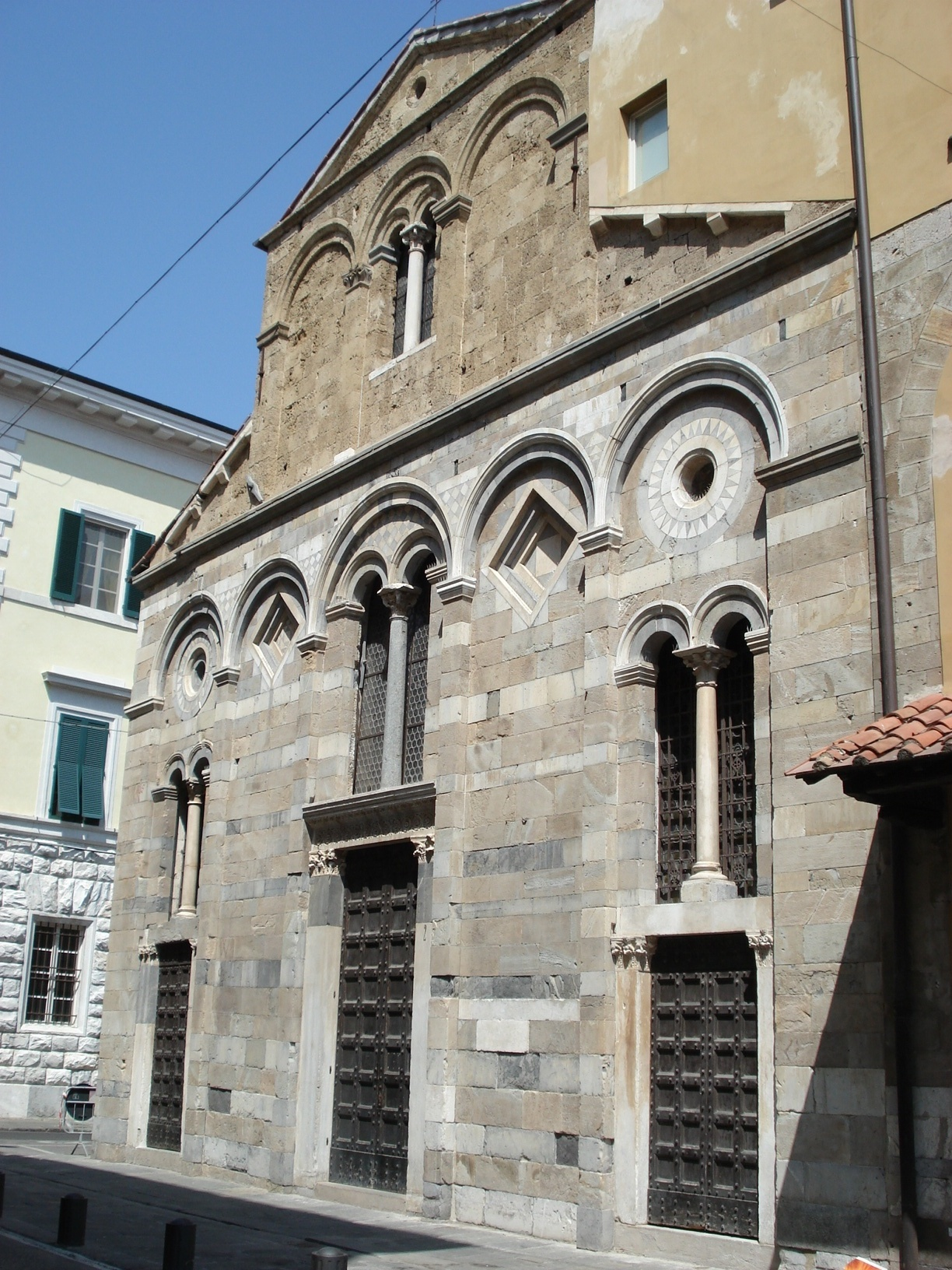 Facciata della chiesa di San Pietro in Vinculis in Pisa